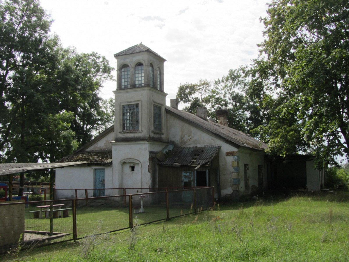 Сядзіба ў Ліпнішках. Афіцына